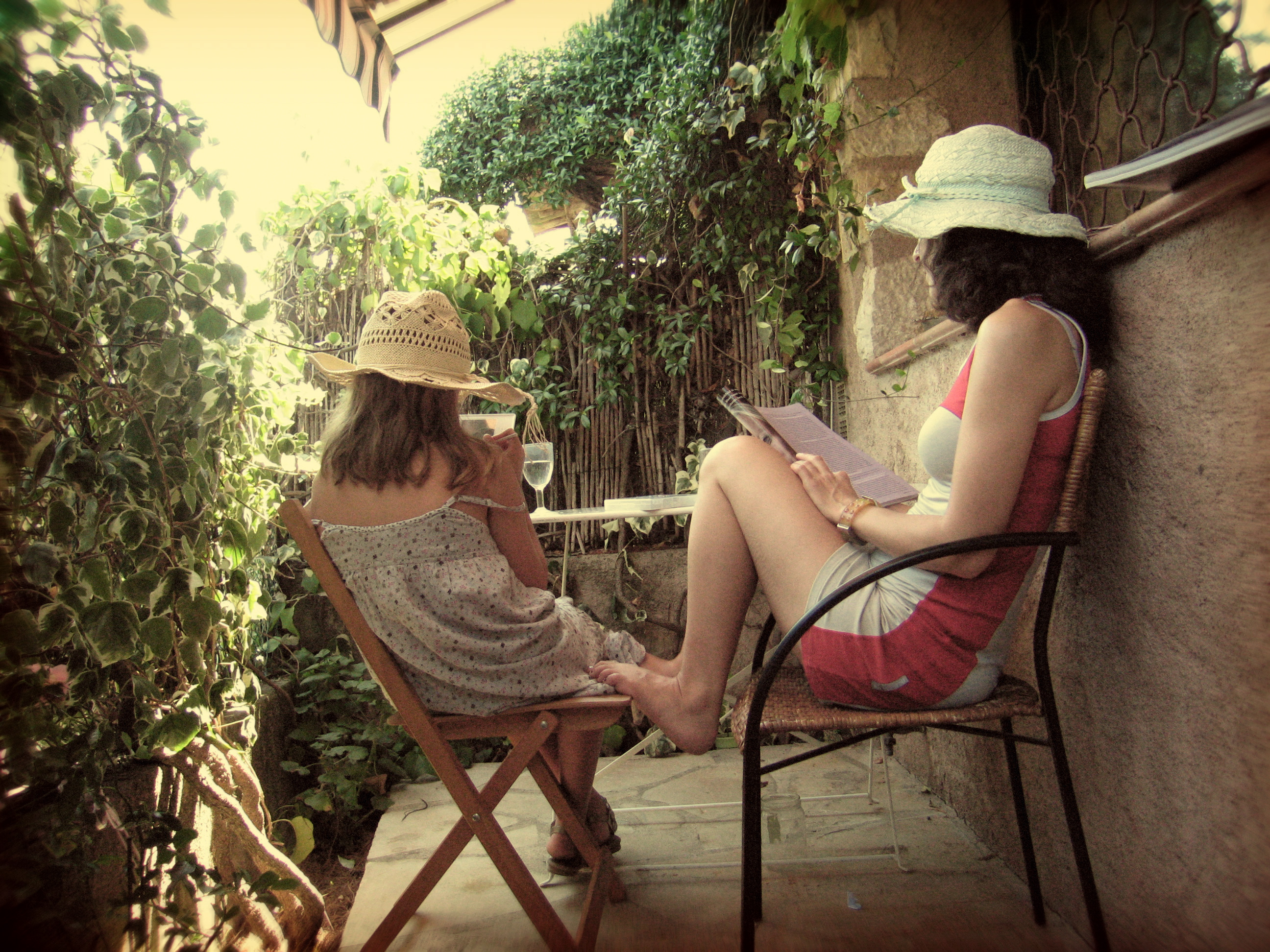 week-end-pleasure